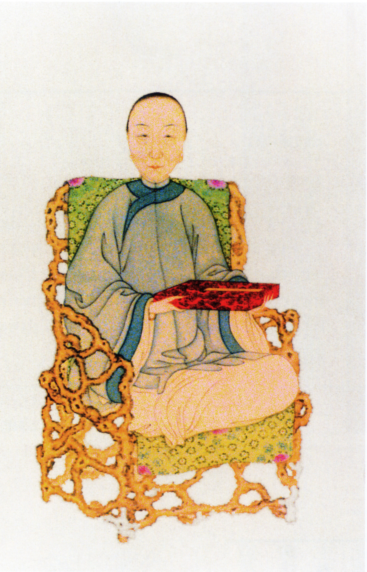 中文（台灣）: 惲珠（1771年7月29日－1833年6月1日）